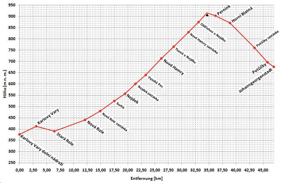 vereinfachtes Höhenprofil der Bahnstrecke Karlovy Vary-Johanngeorgenstadt